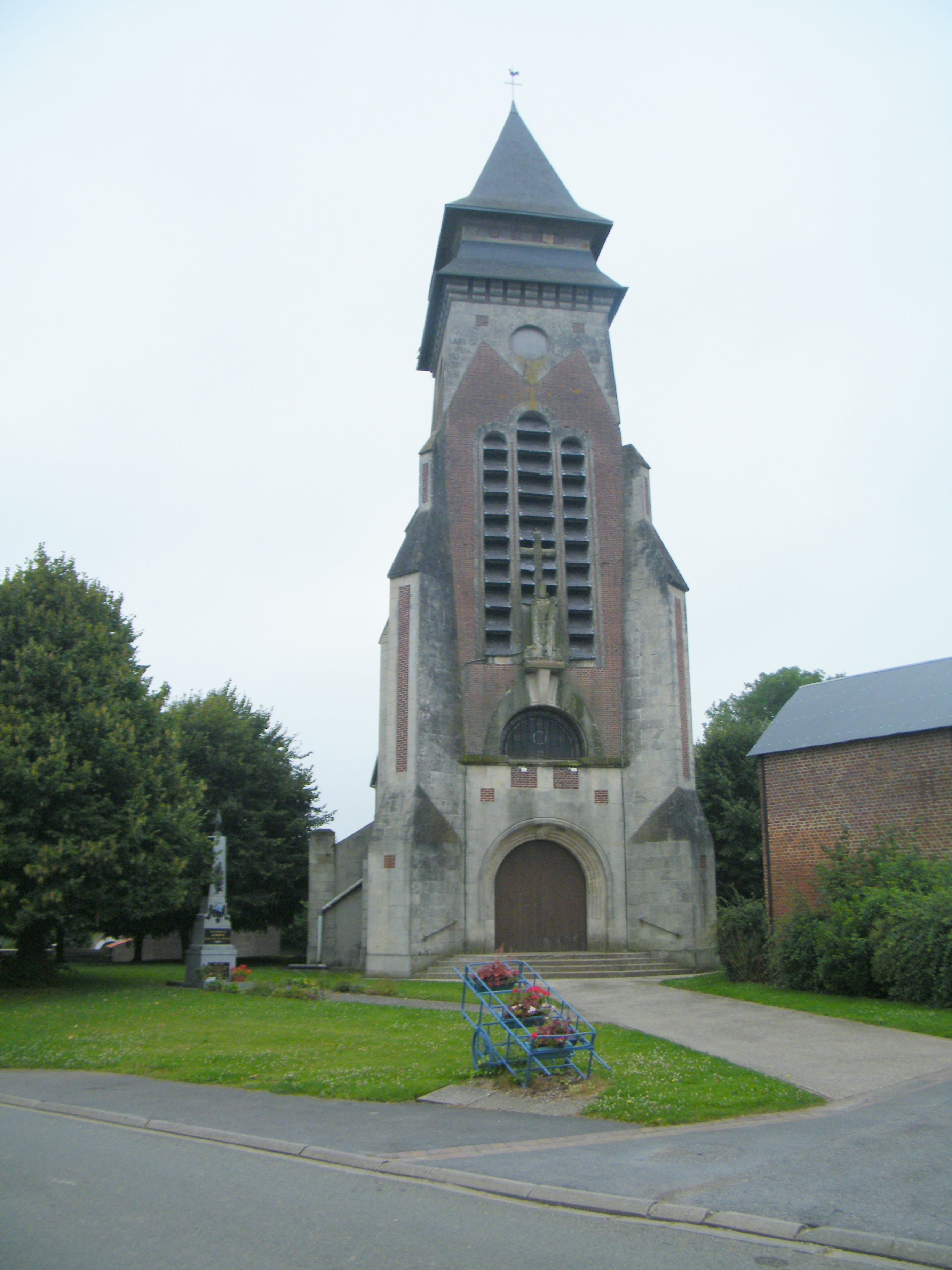 Eglise.